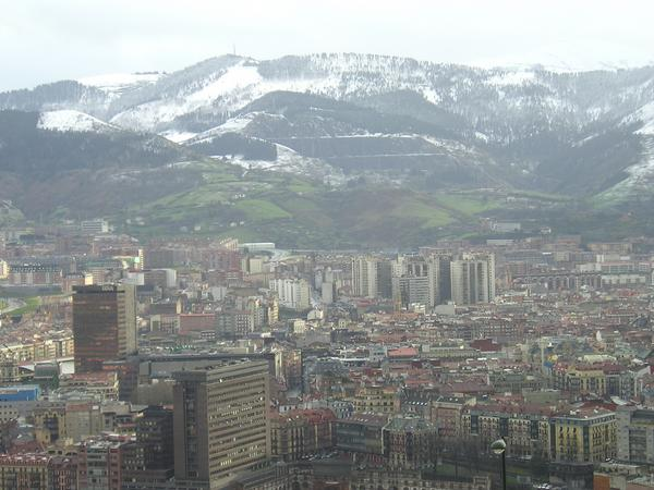 Bilbo neguan, atzeko mendiak elurtuta daudelarik.